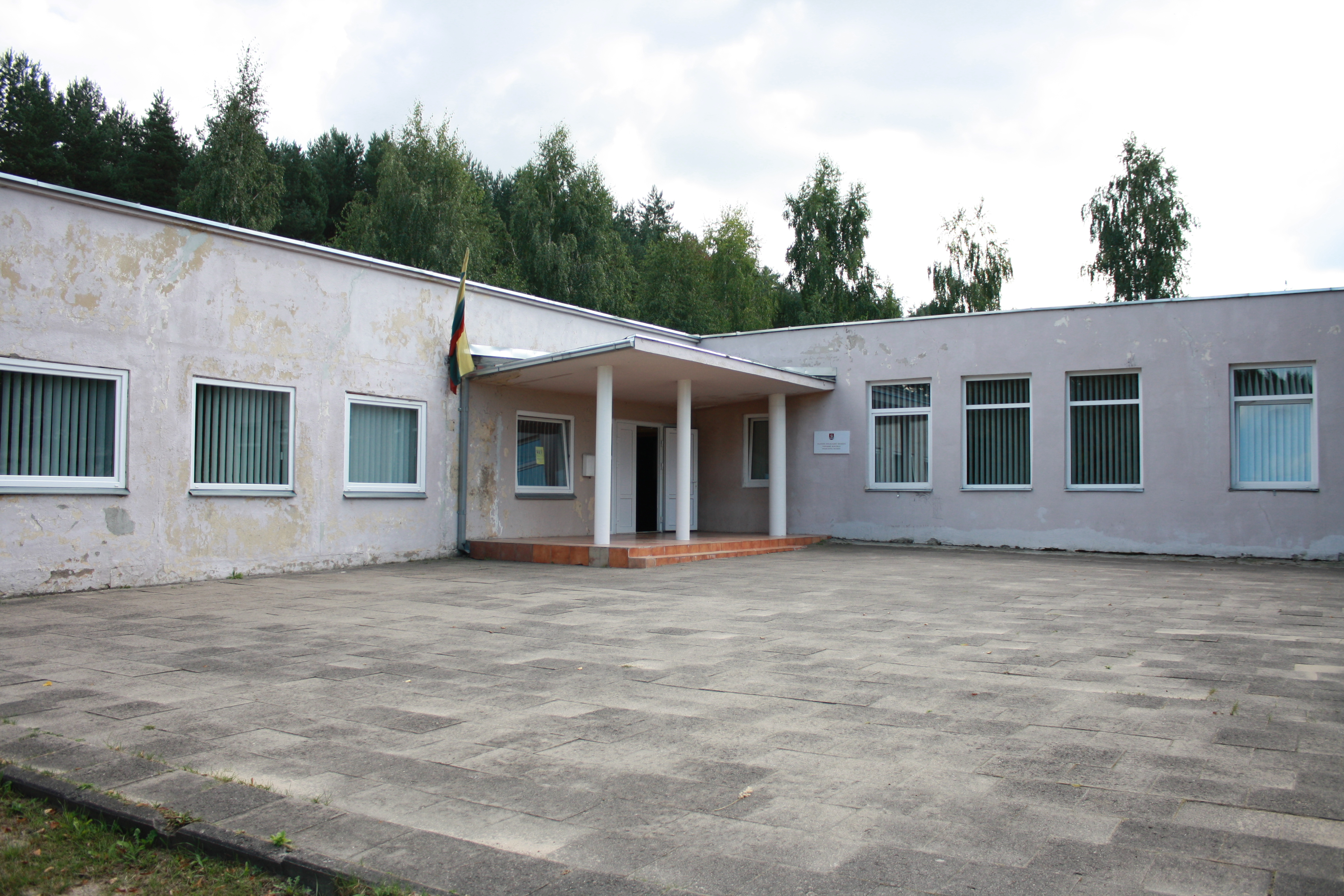 Vilniaus Dvarčionių pradinė mokykla